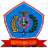 Diperoleh dari Situs Resmi Pemerintah Kabupaten Sorong Selatan